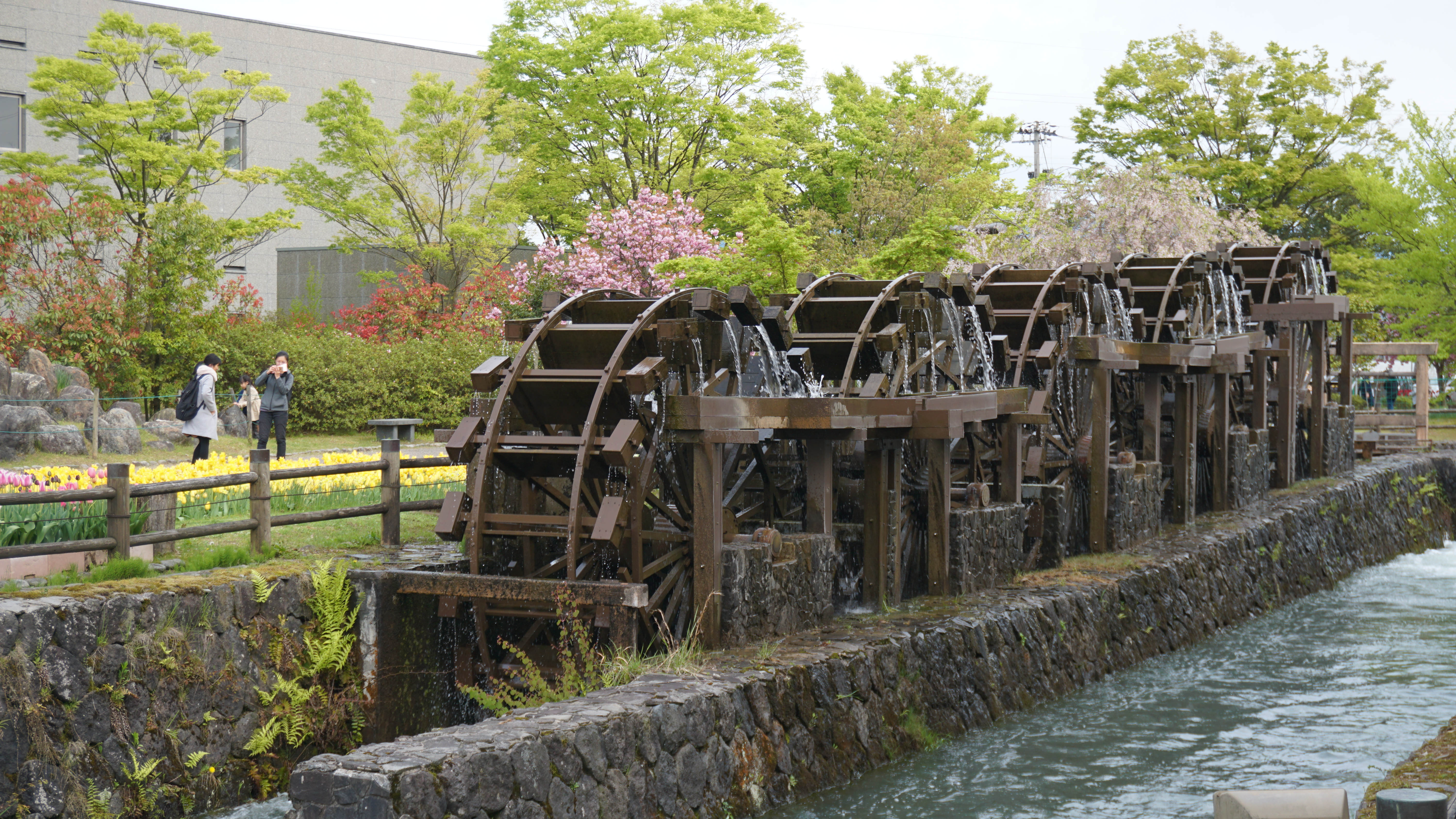 砺波チューリップ公園内の水車